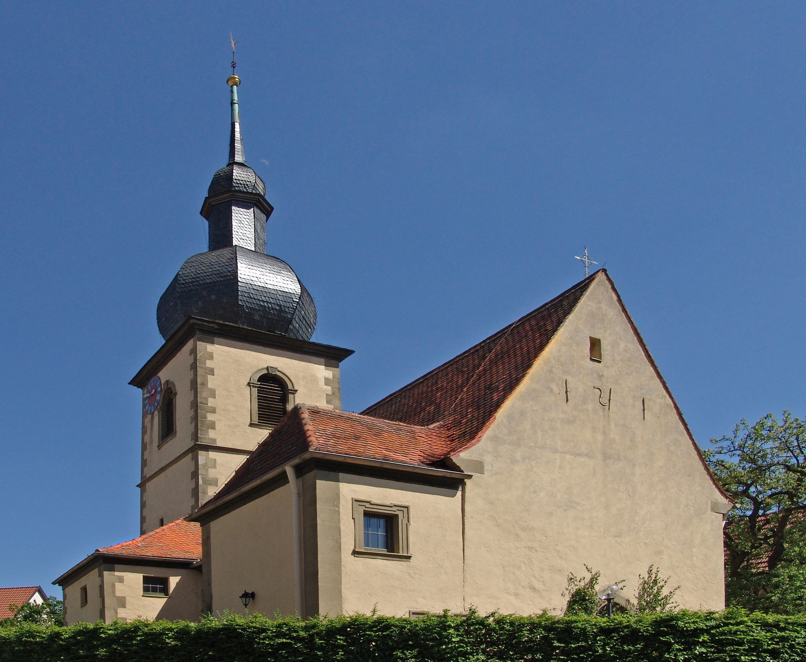 Niederwerrn - ev.-luth. Dorfkirche